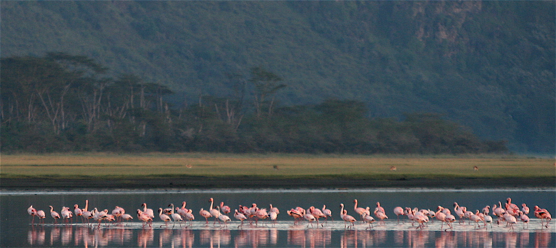 Lesser Flamingo. Lake Nakuru National Park, Kenya.